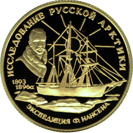 Монета Банка России — «Географическая серия», Исследование Русской Арктики, Ф. Нансен, 50 рублей, реверс